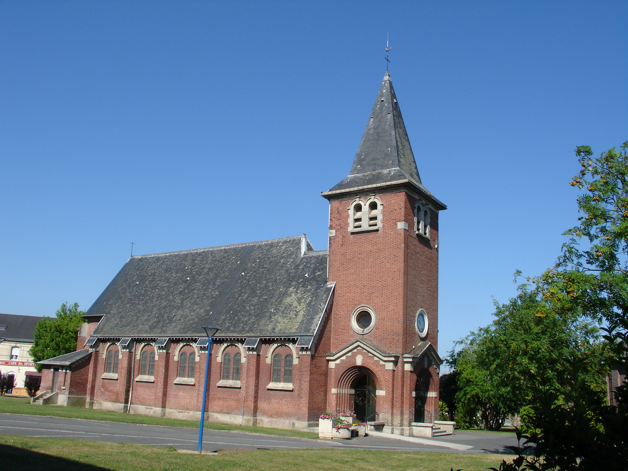 Église de Beaurains